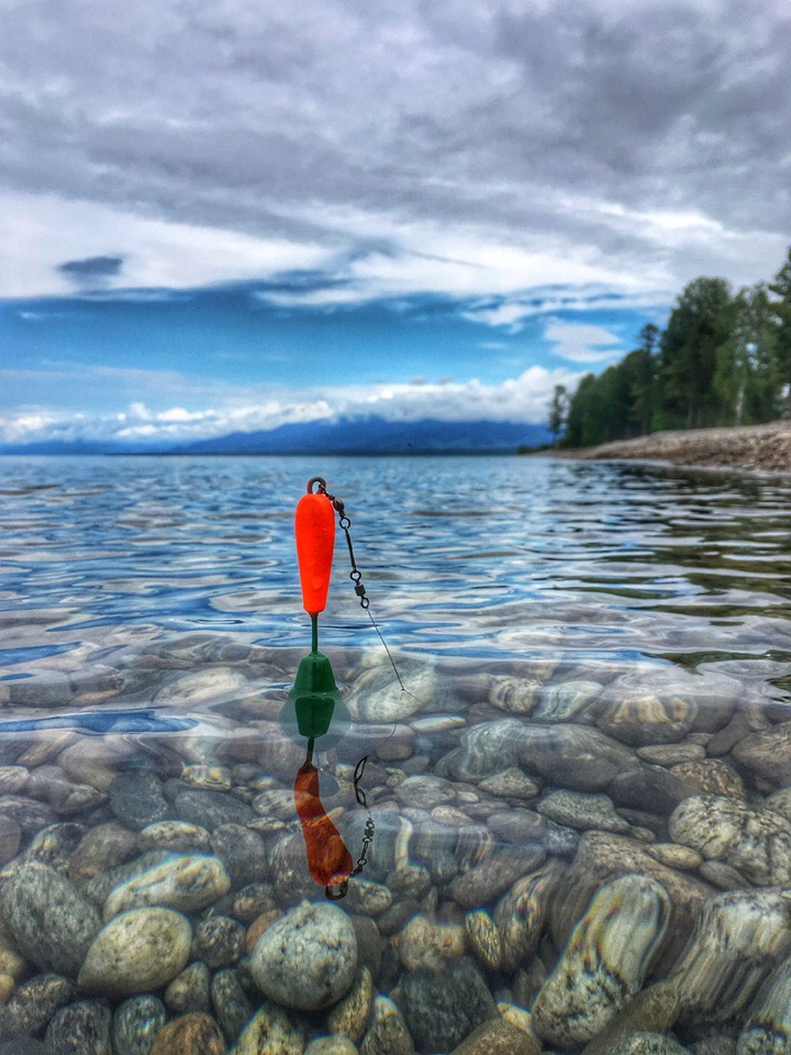 Fishing rod float. Lake Baikal. Eastern Siberia